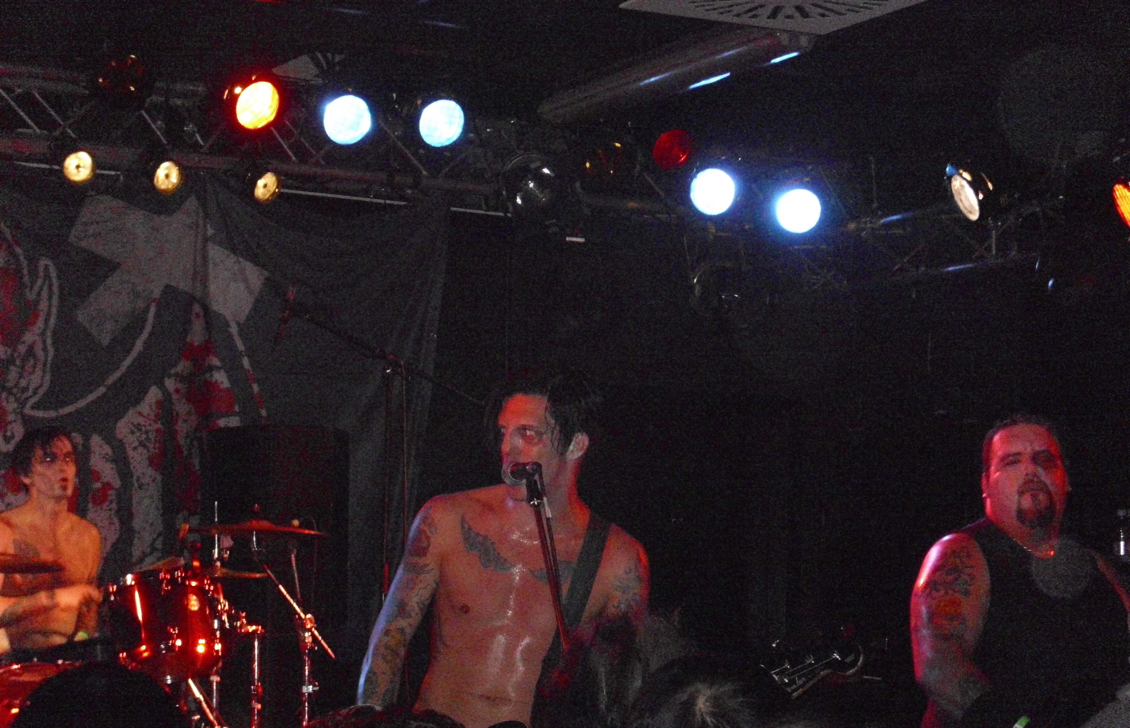 Blitzkid-Konzertfoto